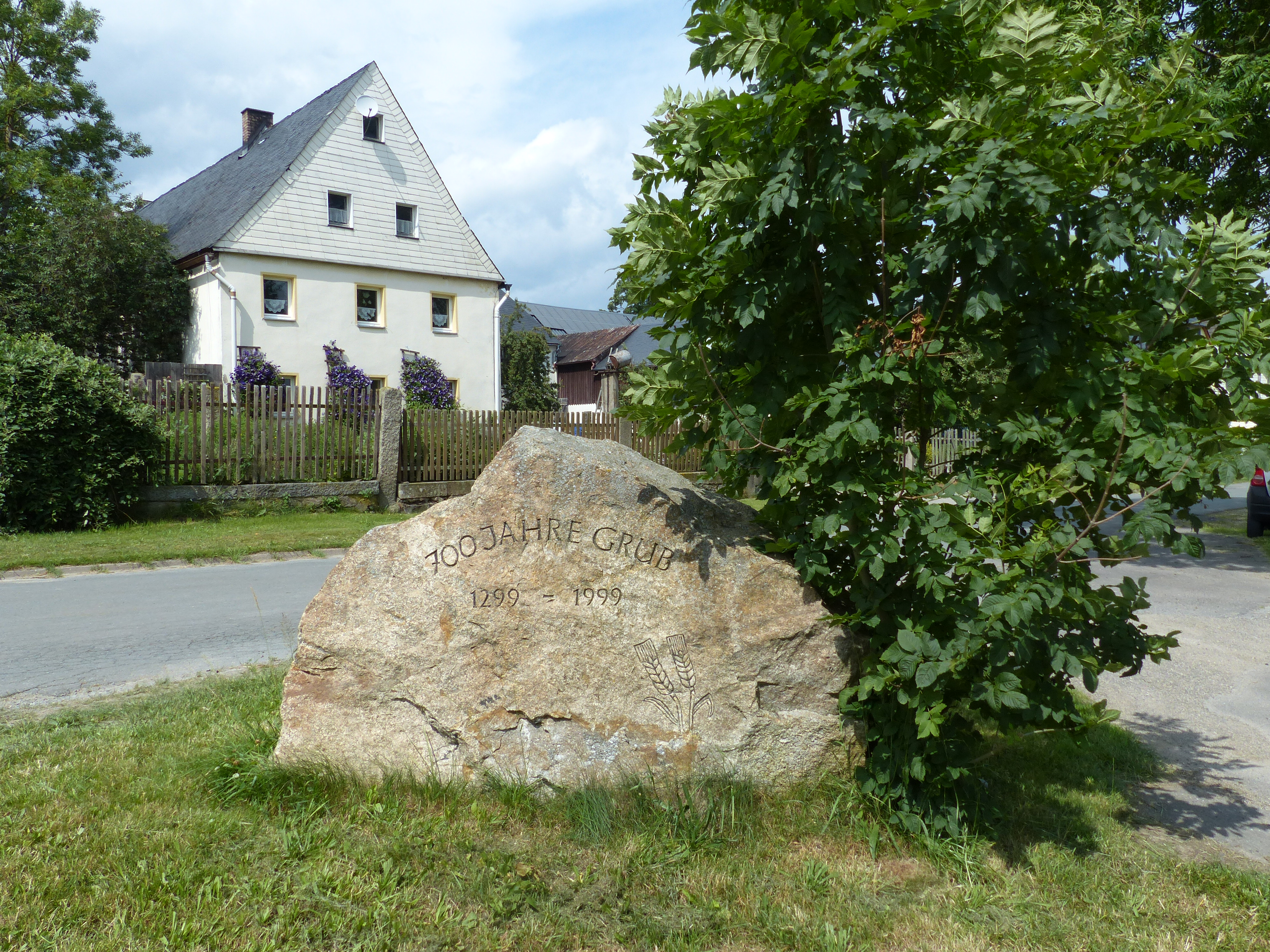 Bauwerk in der Stadt Weißenstadt